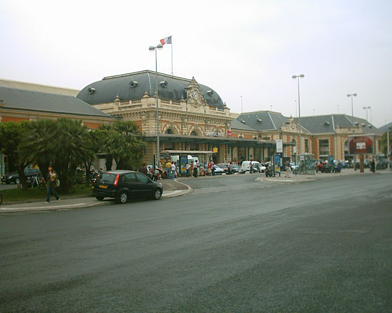 Gare de Nice-Ville, Nice.